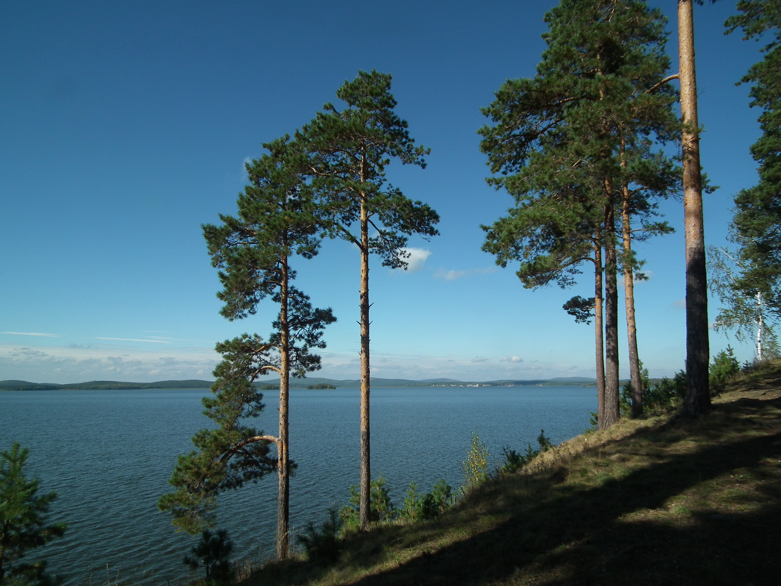 Среднеуральский: , Свердловская область This image is related to the protected area of Russia number 6600004